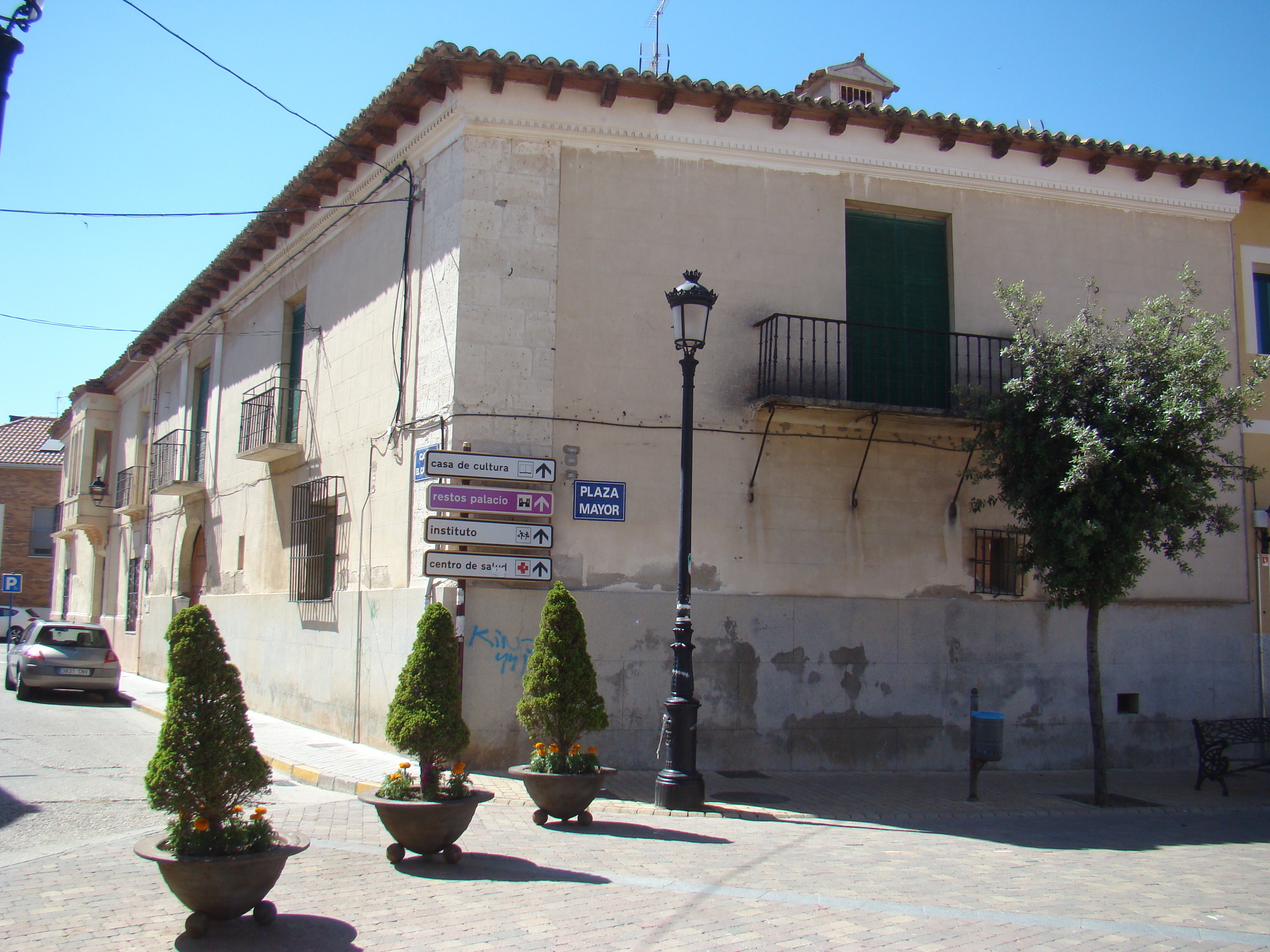 Cigales, Valladolid (España). Esquina de plaza Mayor con la calle Campillo. Casa noble.